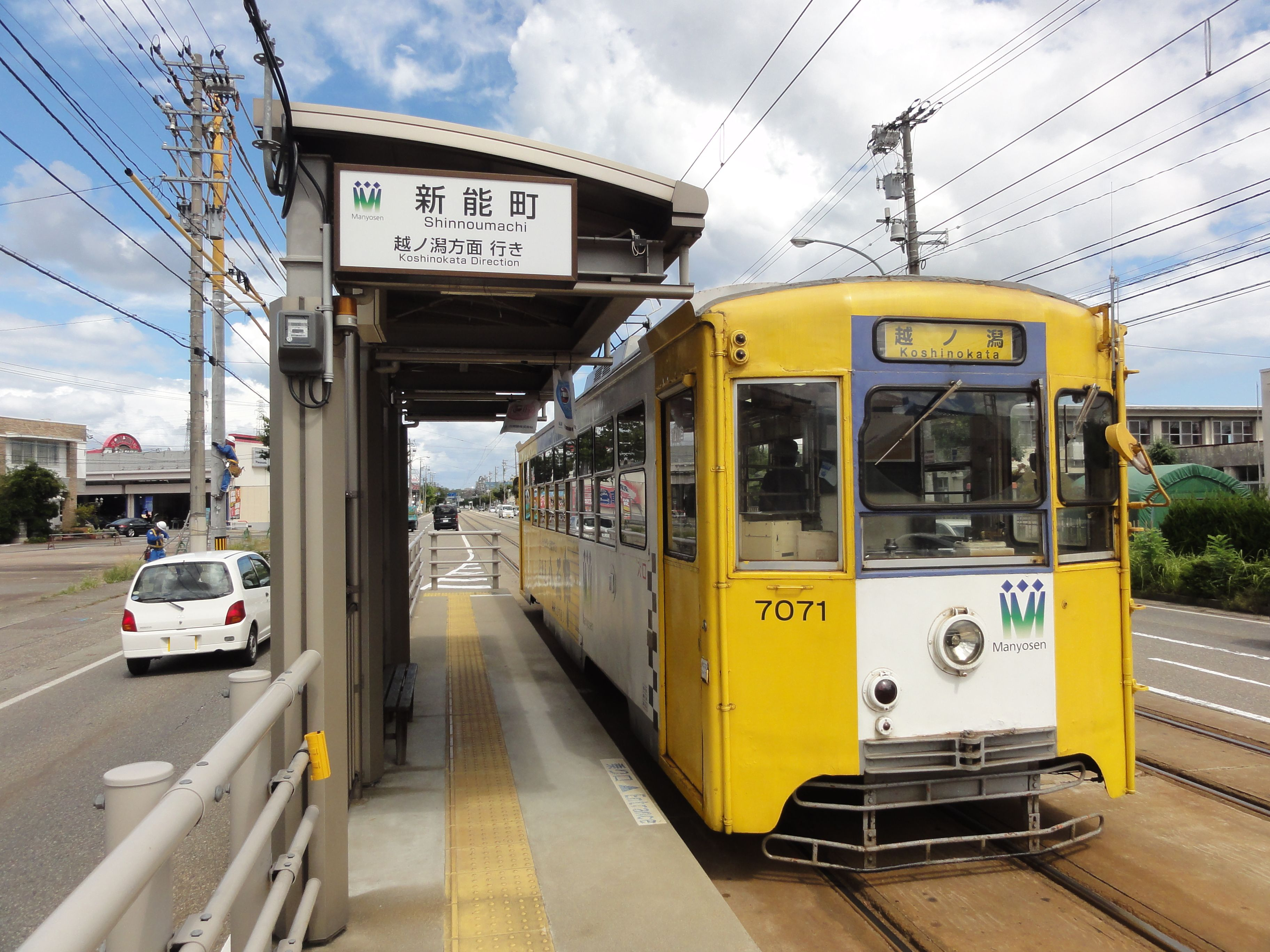 万葉線新能町停留場